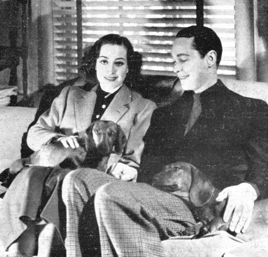 Joan Crawford e Franchot Tone al tempo del loro matrimonio - immagine pubblicata in Italia nel 1936